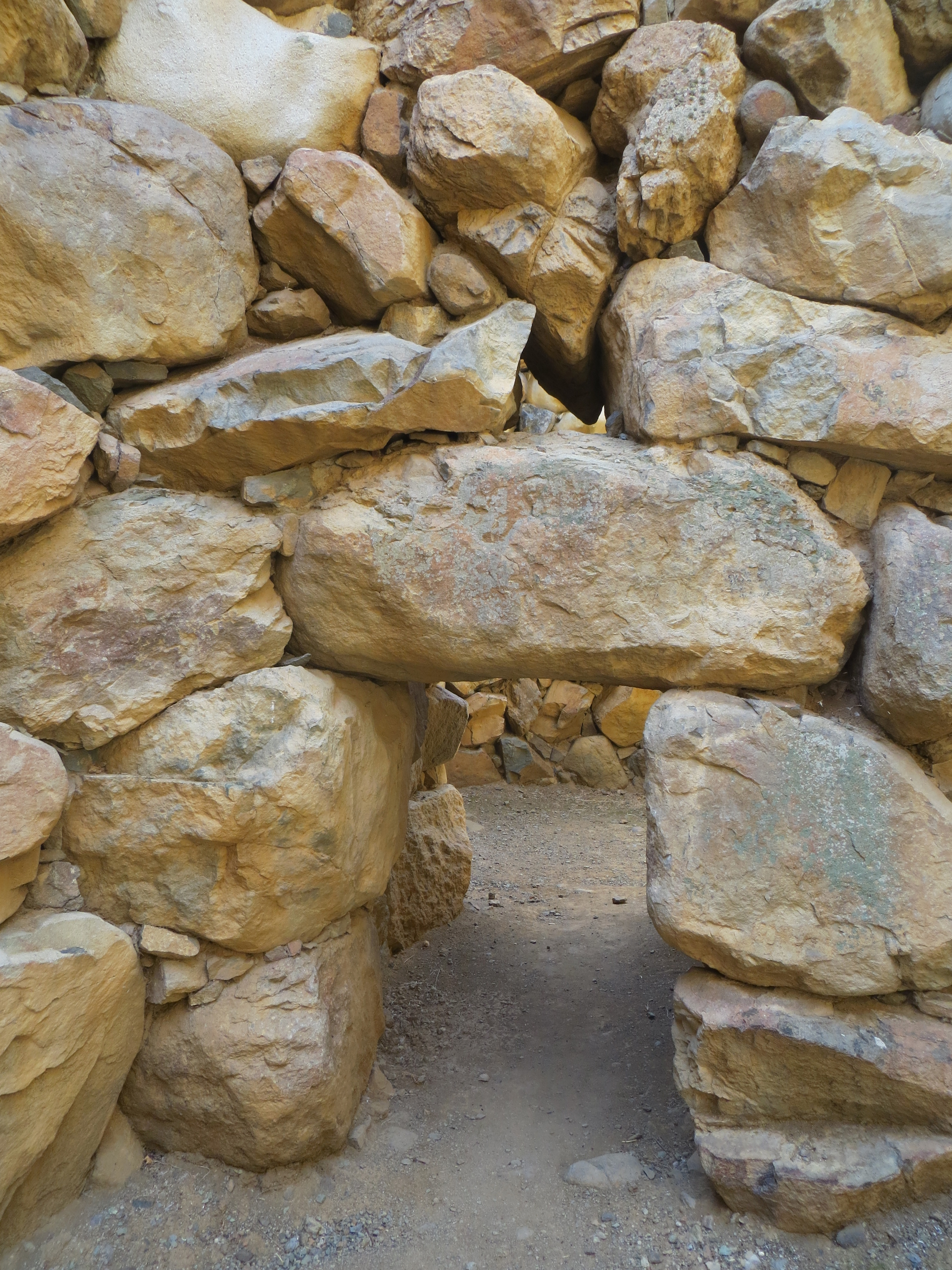 Nuraghe Sa Domu 'e S'Orku This is a photo of a monument which is part of cultural heritage of Italy.